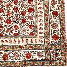 Photo d'un carré de coton fabriqué début XIXe siècle, visible au Musée de l'étoffe imprimée de mulhouse, Haut-Rhin (France).